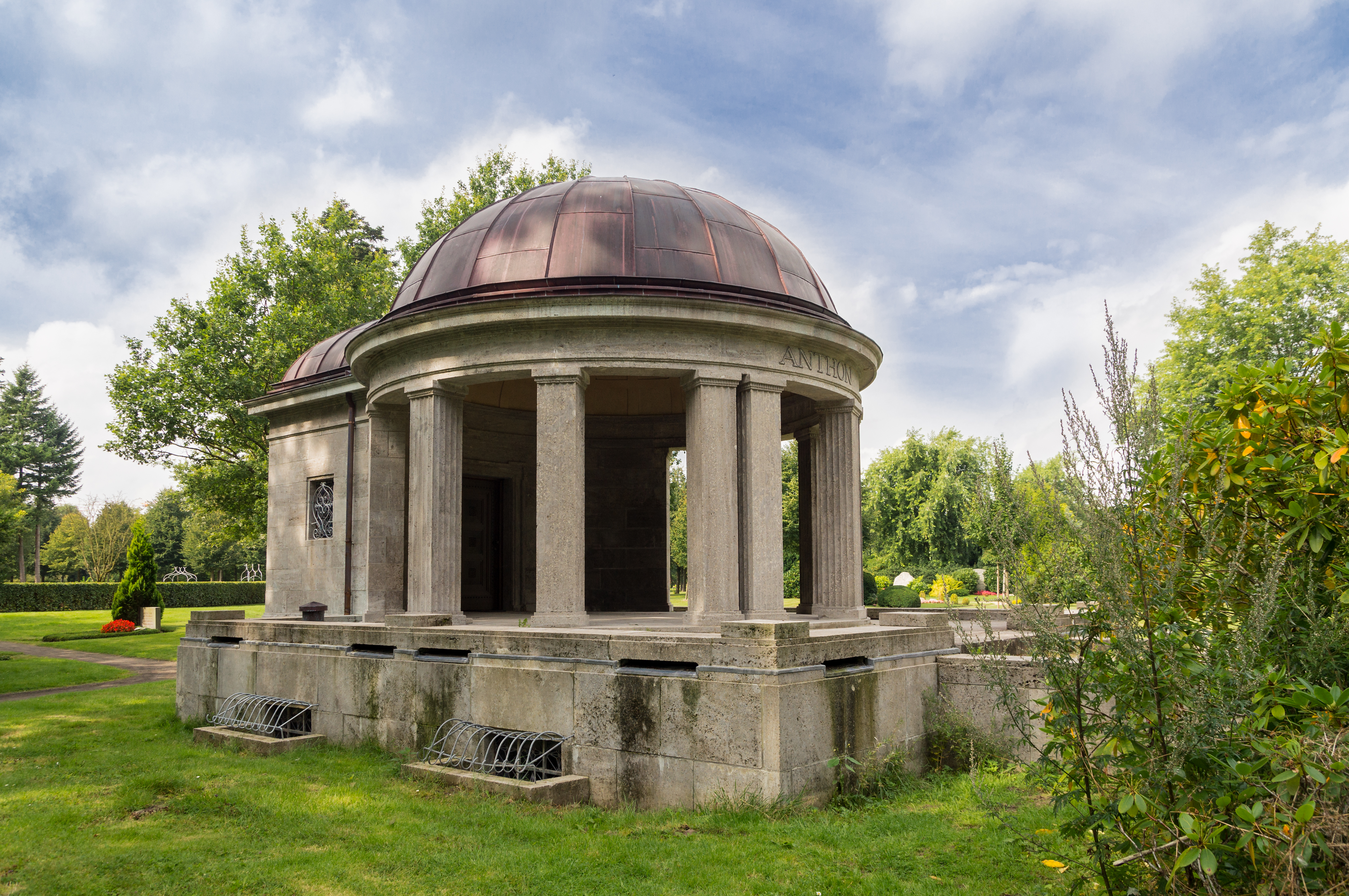 Flensburg-Friesischer Berg, Am Friedenshügel 45-47, Mausoleum Anthon auf dem Friedhof Friedenshügel, Denkmal-Nr.